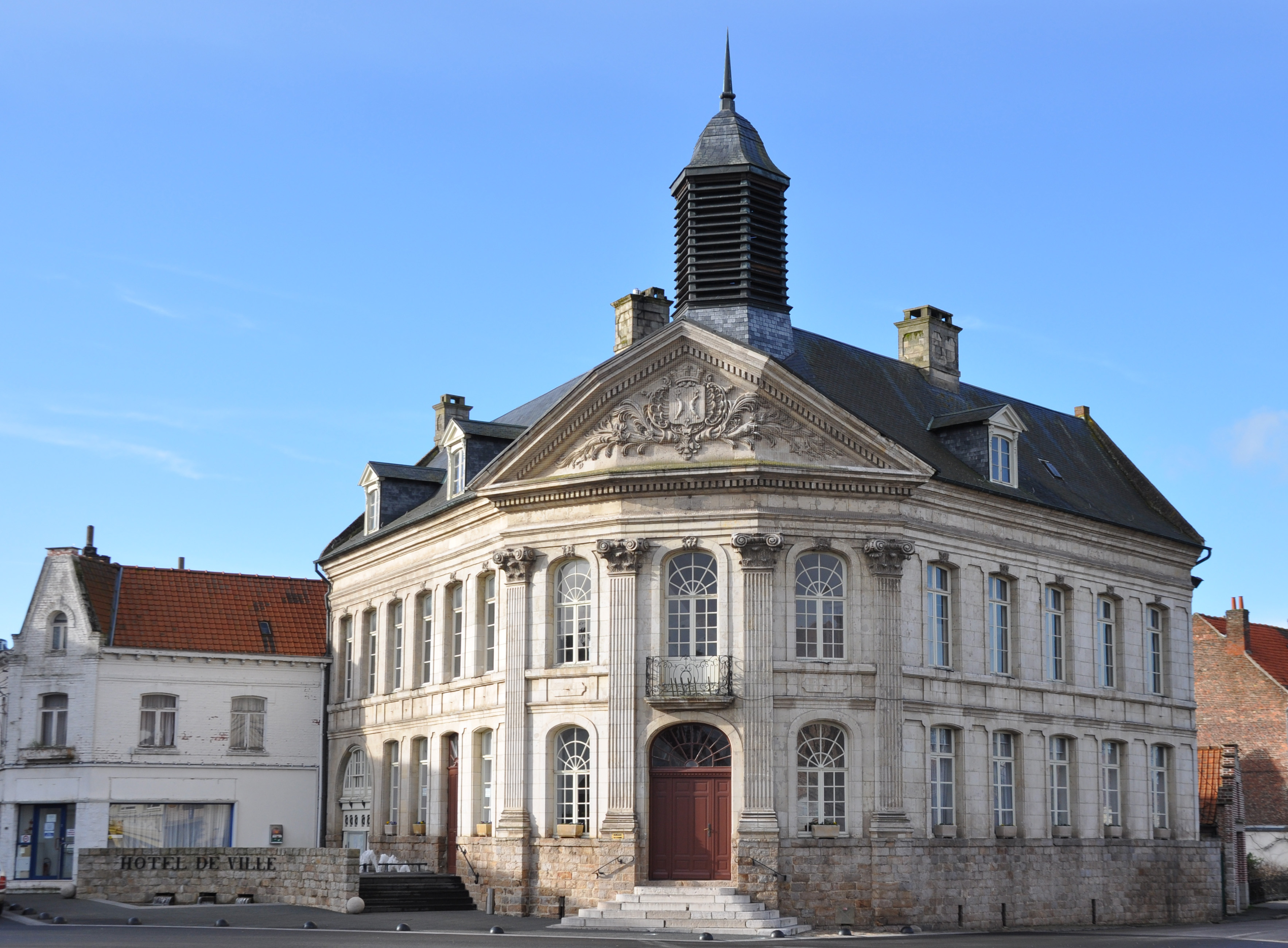 L'Hôtel de ville de Saint-Venant Pas-de-Calais.- France. .